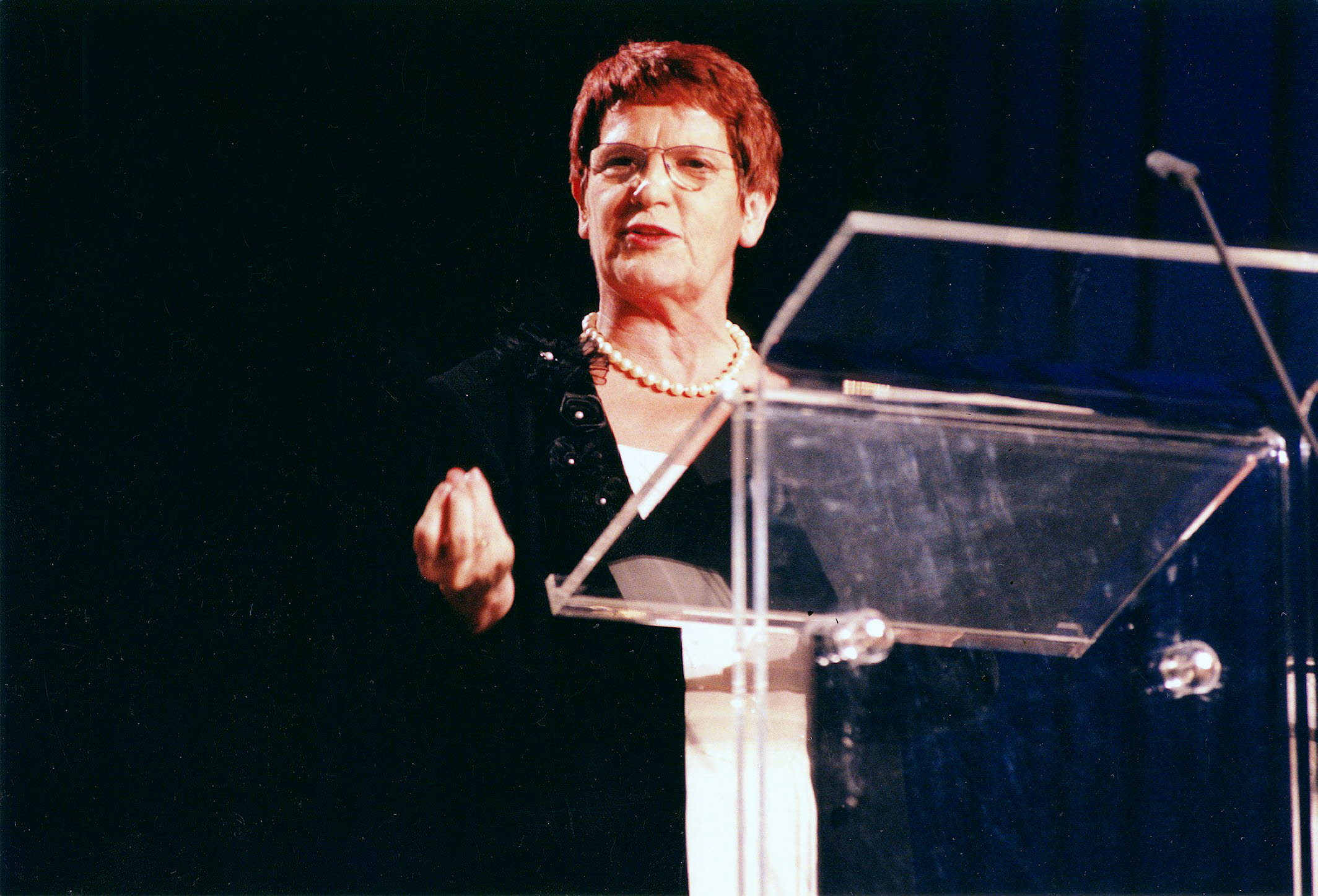 Rita Süssmuth beim Internationalen Gesangswettbewerb Neue Stimmen